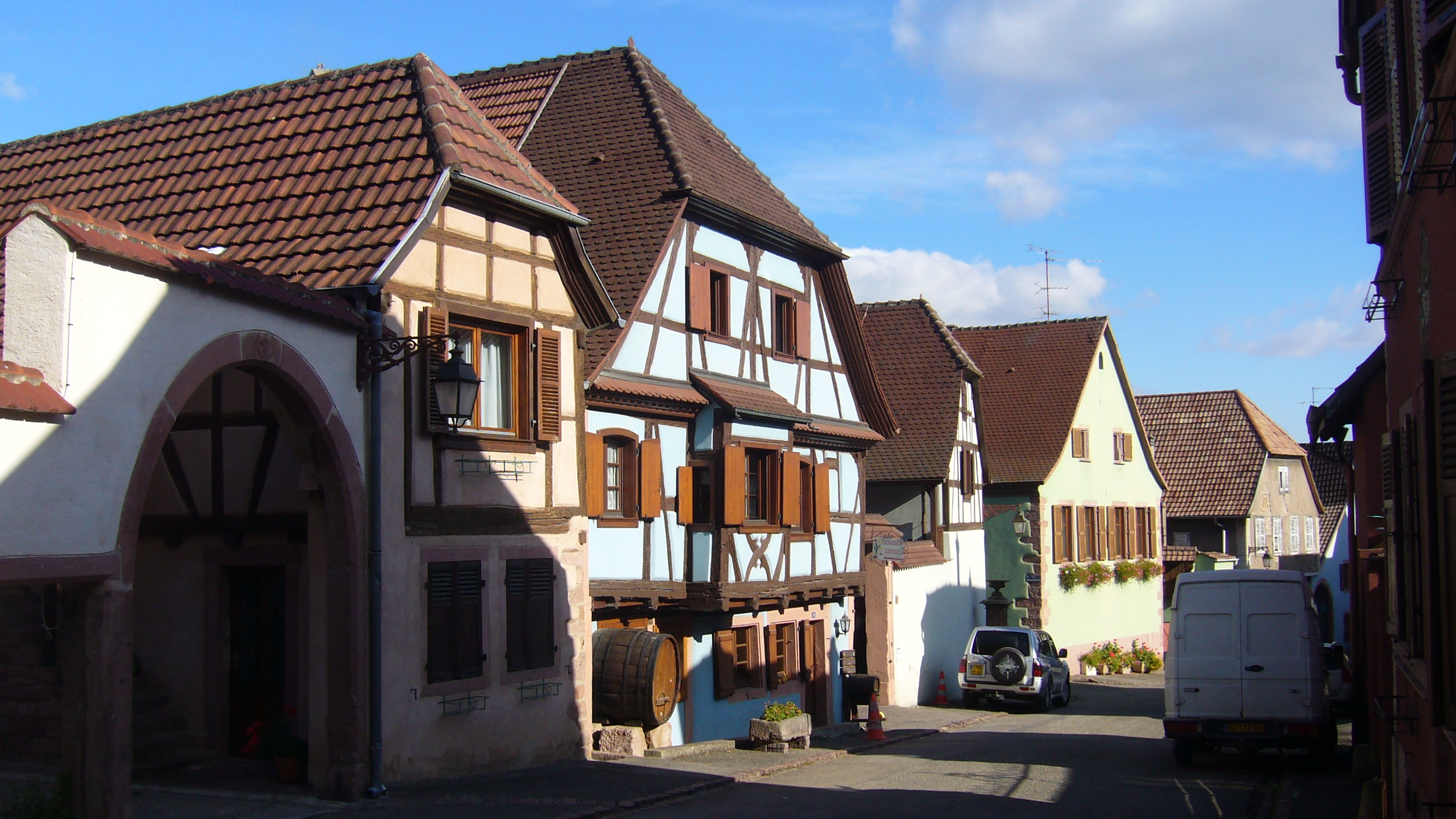 Maison à colombage située 42 rue de Saint-Fulrade à Saint-Hippolyte